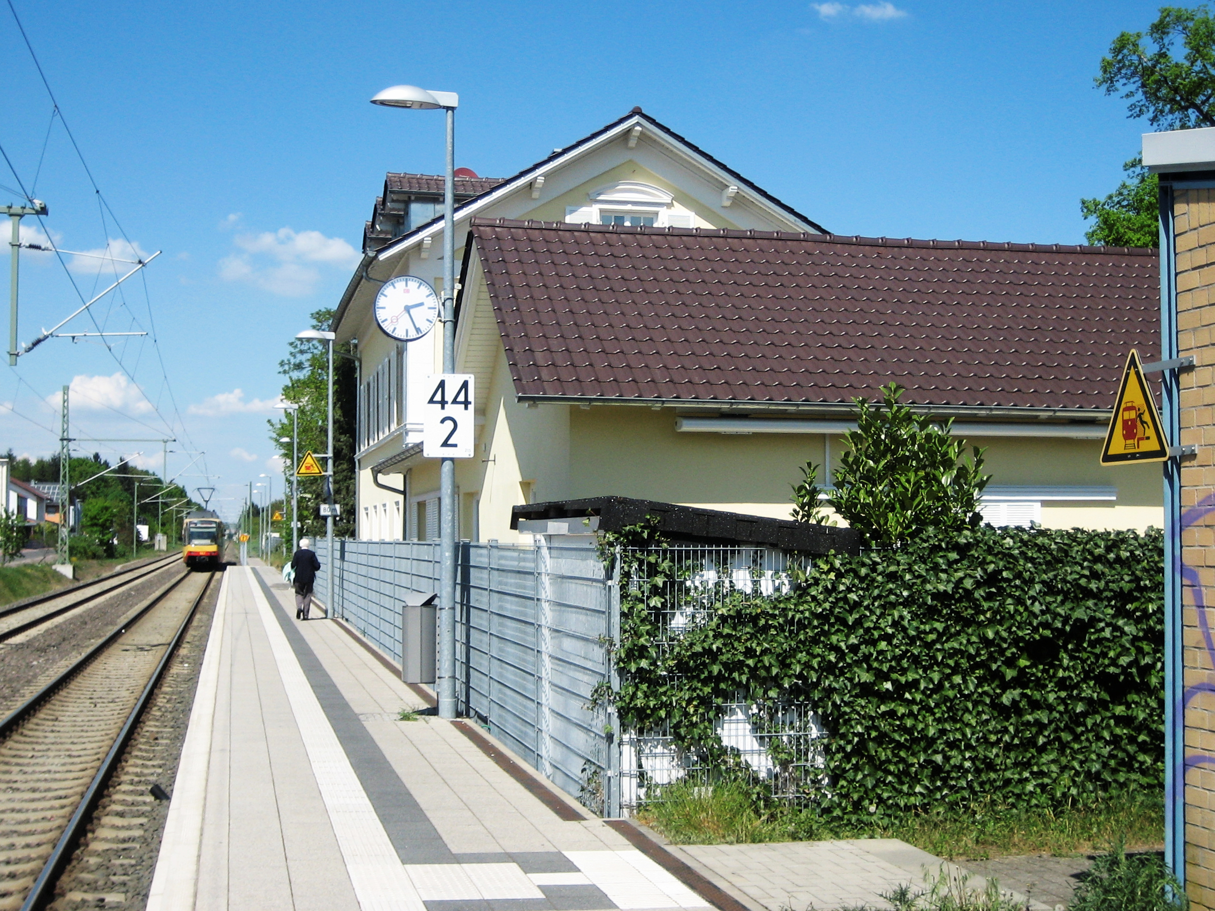 Bahnhof Jockgrim Fahrtrichtung Germersheim